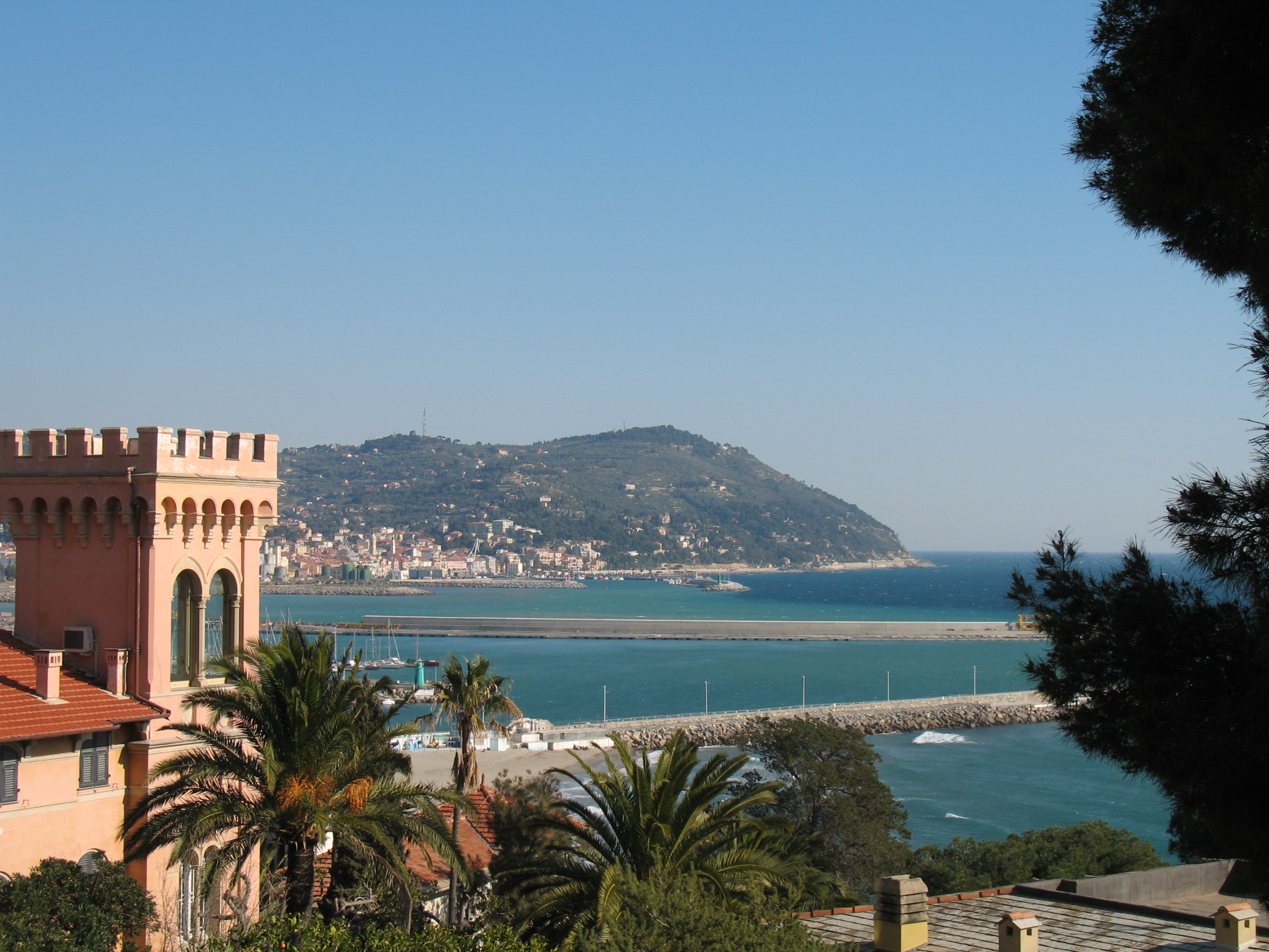 Immagine da Imperia Panorama su Imperia